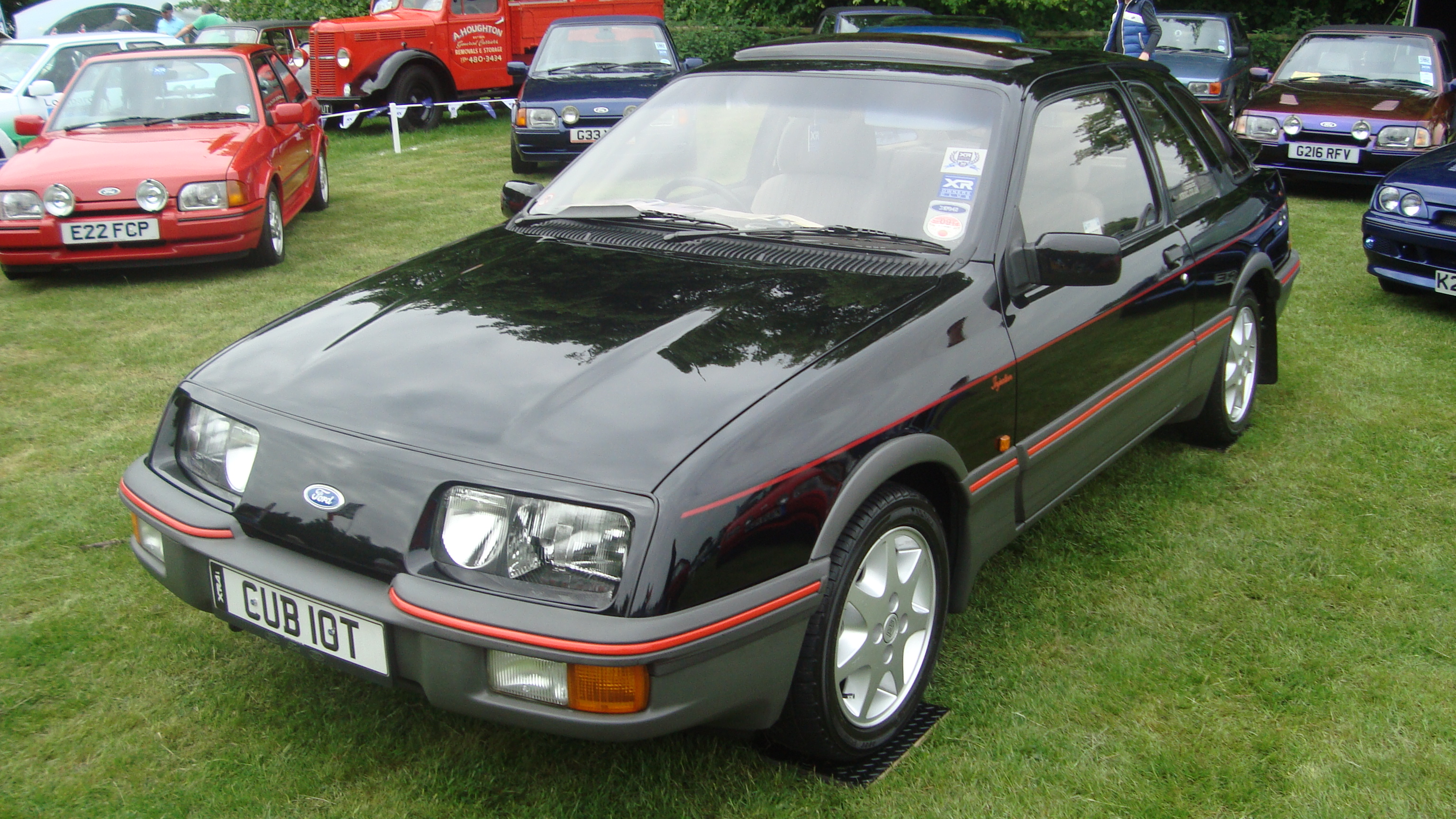 1983 Ford Sierra XR4i